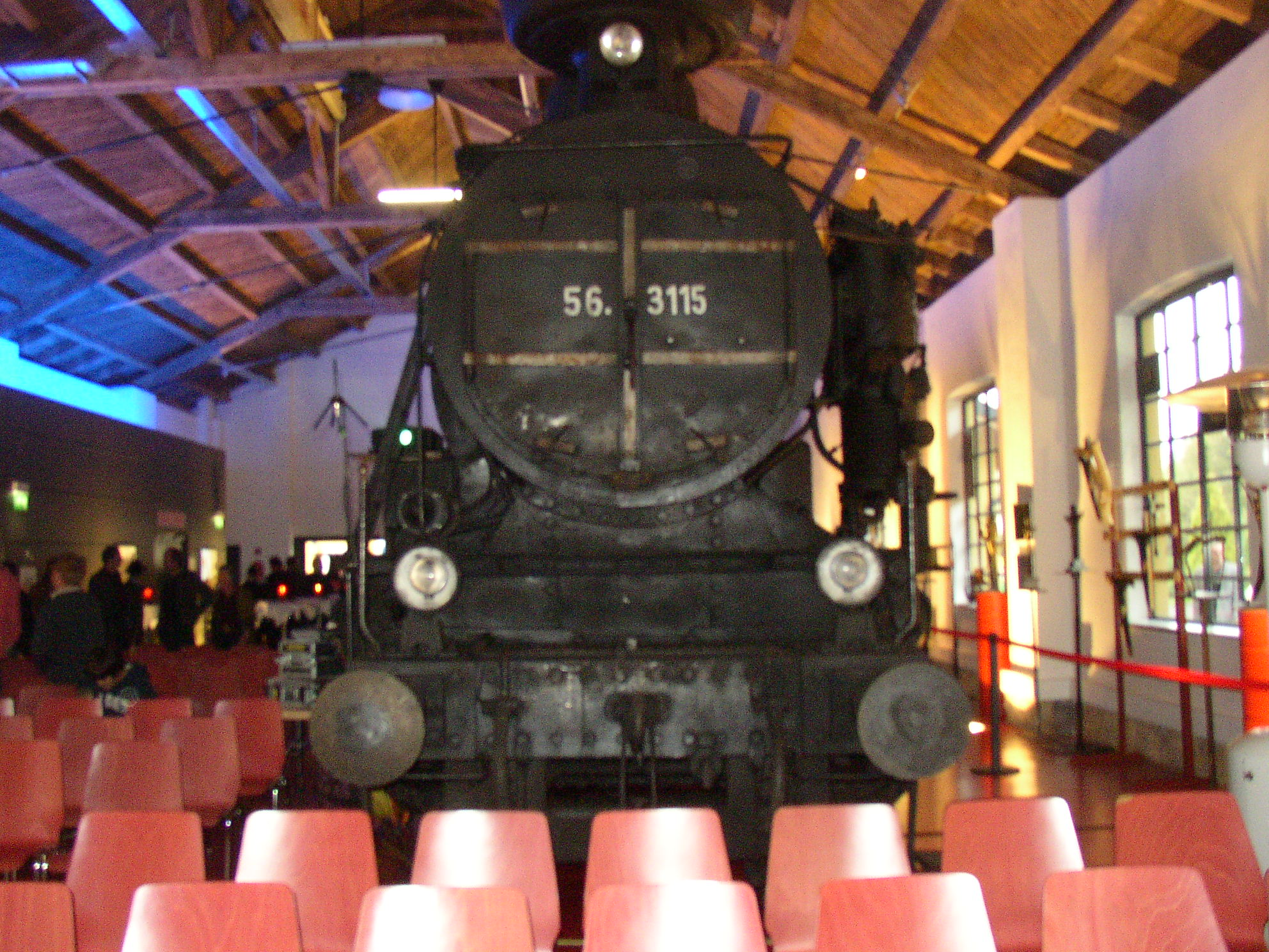 Innenansicht des Technischen Eisenbahnmuseums Lieboch (TEML) mit der 56.3115